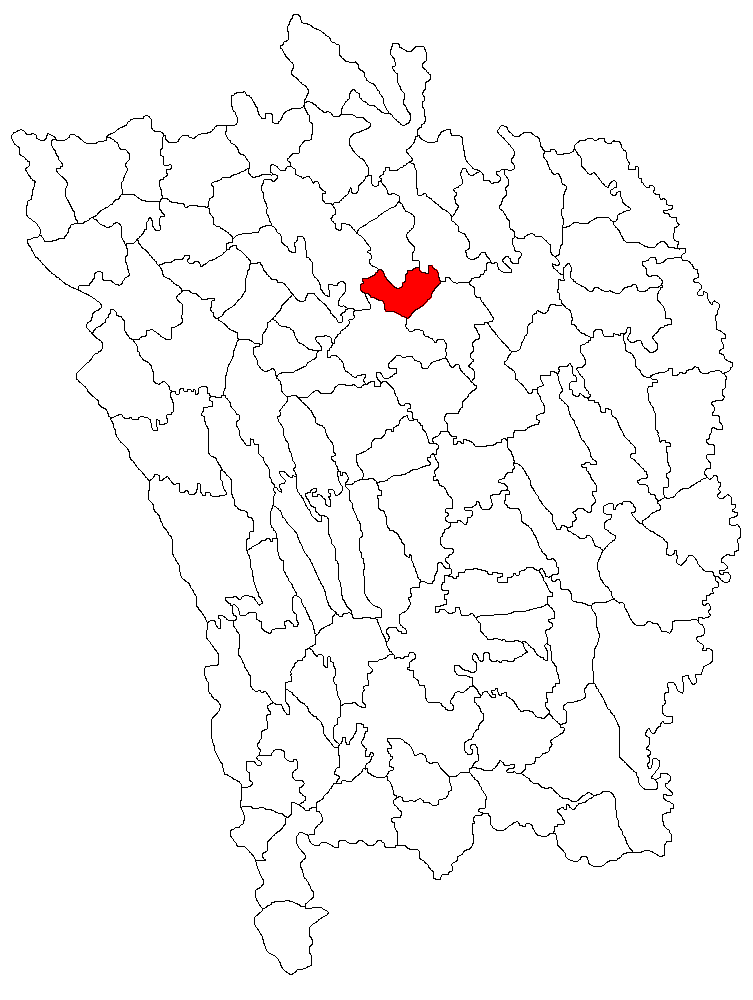 Categorie:Hărţi ale judeţului Vaslui